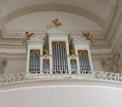 Karl-Mauracher-Orgel Sebastianskirche